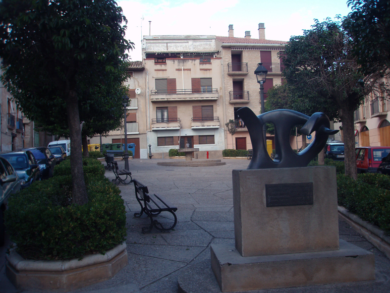 Plaza de San Salvador (Tudela), en 2010